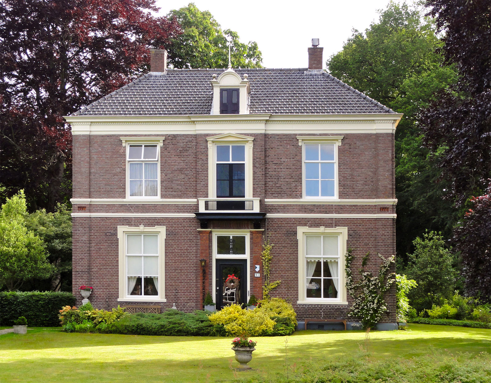 Voormalige Gerard Adriaan van Swietentuinbouwschool - Maatschappij van Weldadigheid - Koningin Wilhelminalaan 91 Frederiksoord - rijksmonument